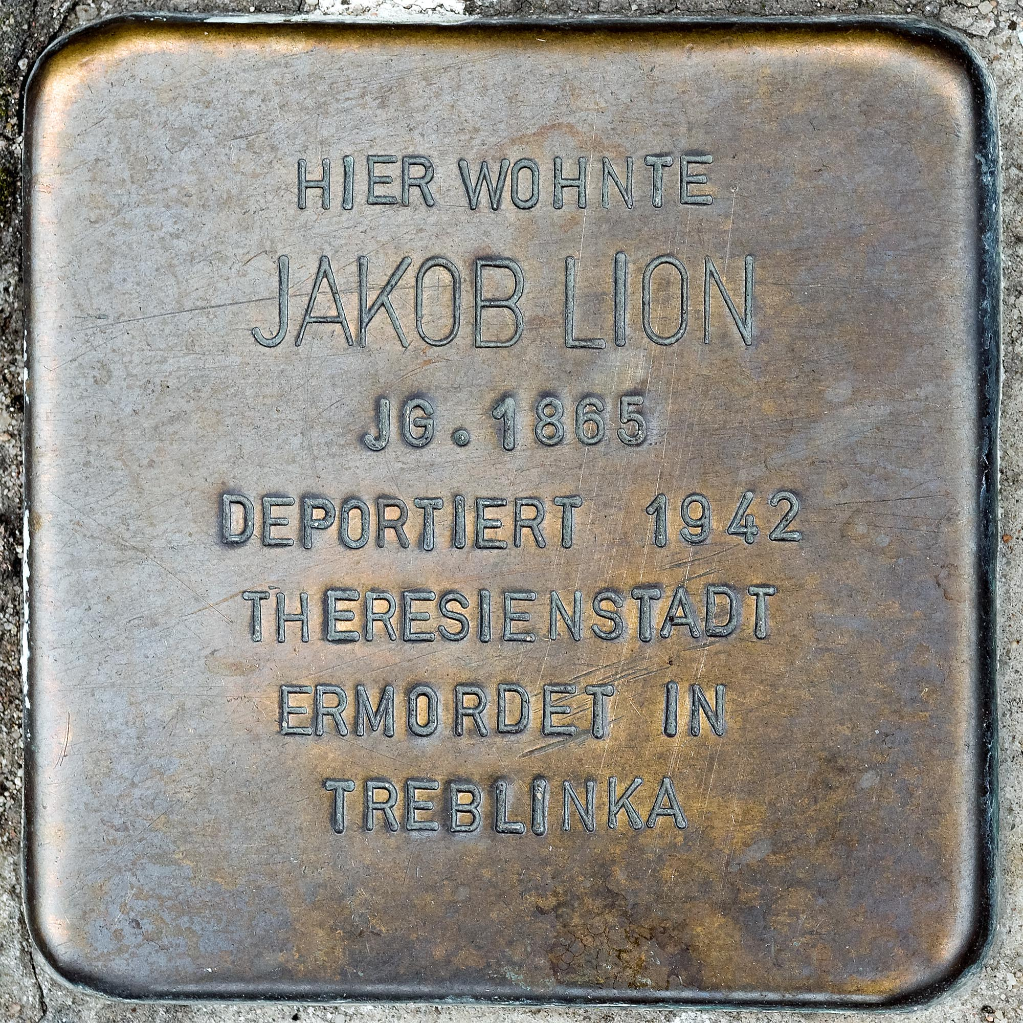 Stolperstein Lion, Jakob